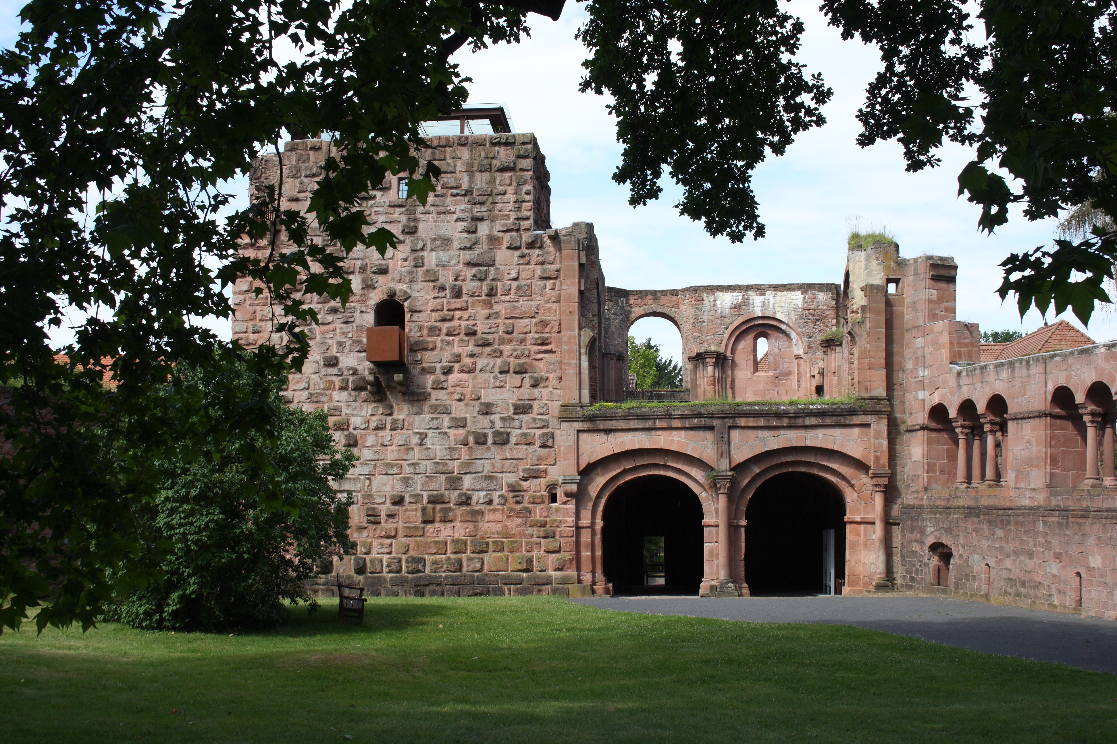 Kaiserpfalz Gelnhausen in Gelnhausen im Main-Kinzig-Kreis (Hessen)